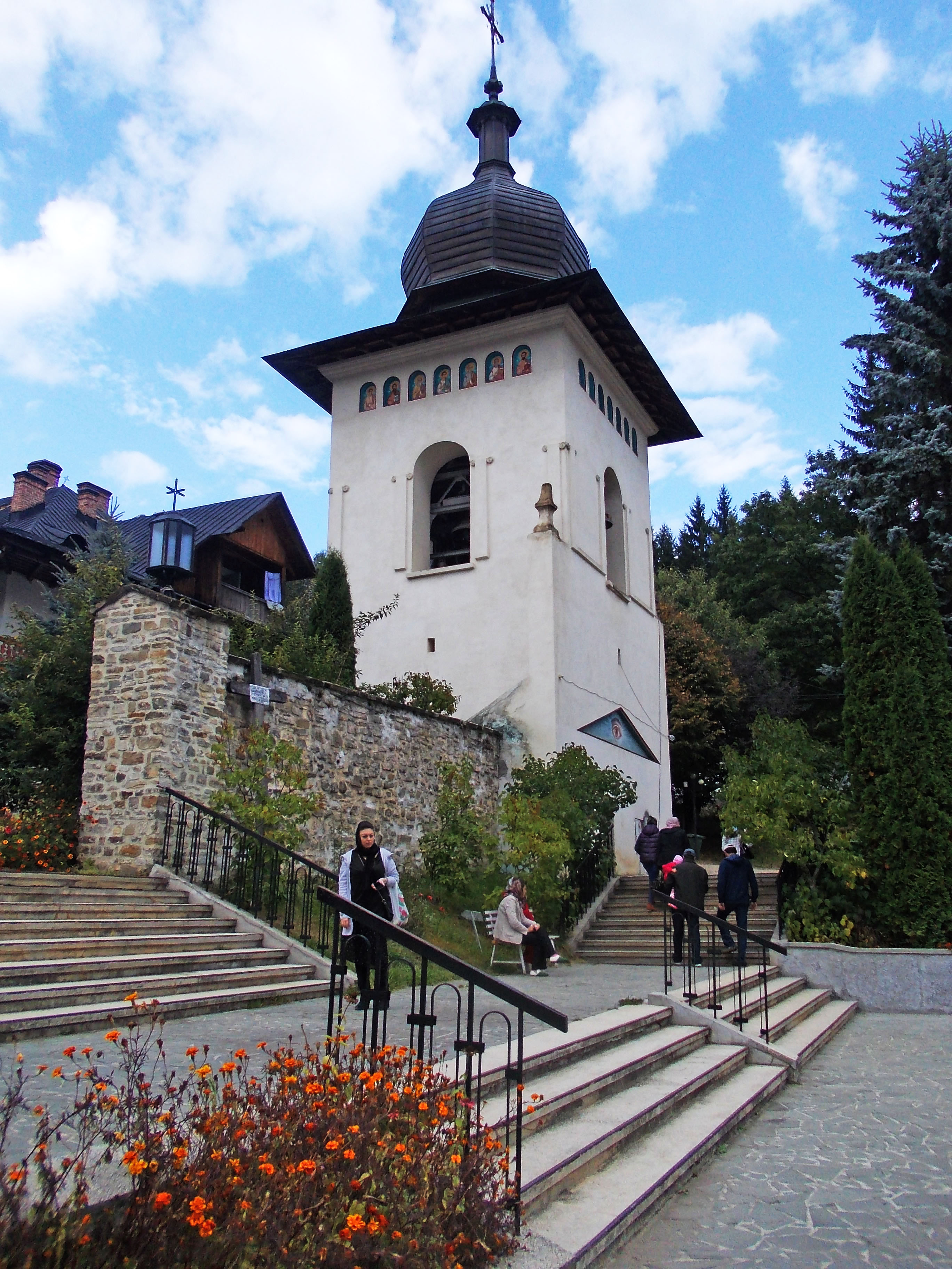 Biserica „Nașterea Maicii Domnului” 01